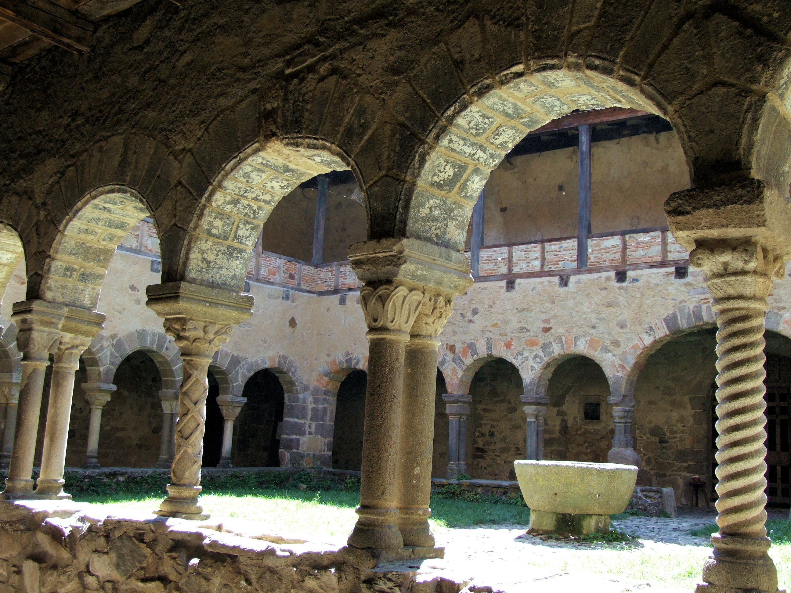 Lavaudieu - Abbaye - Cloître